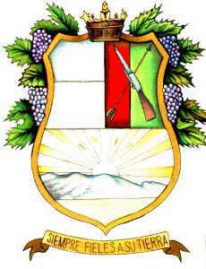 Escudo del municipio de Cuatrociénegas, Coahuila